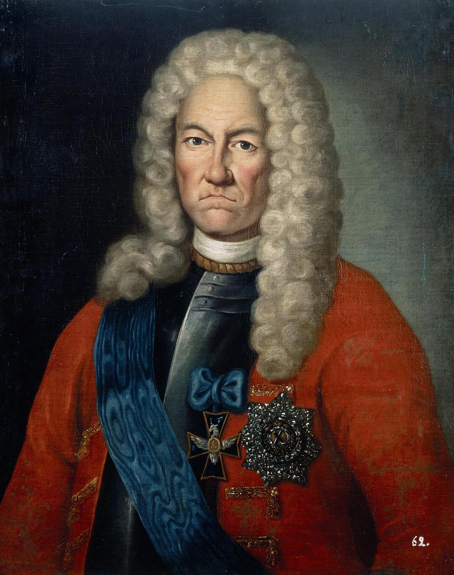 Портрет Якова Вилимовича Брюса